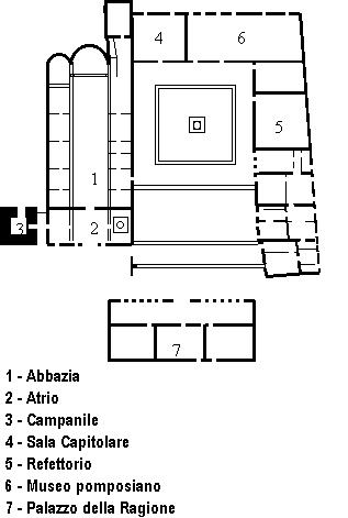 Abbazia di Pomposa, Ferrara, pianta del complesso.